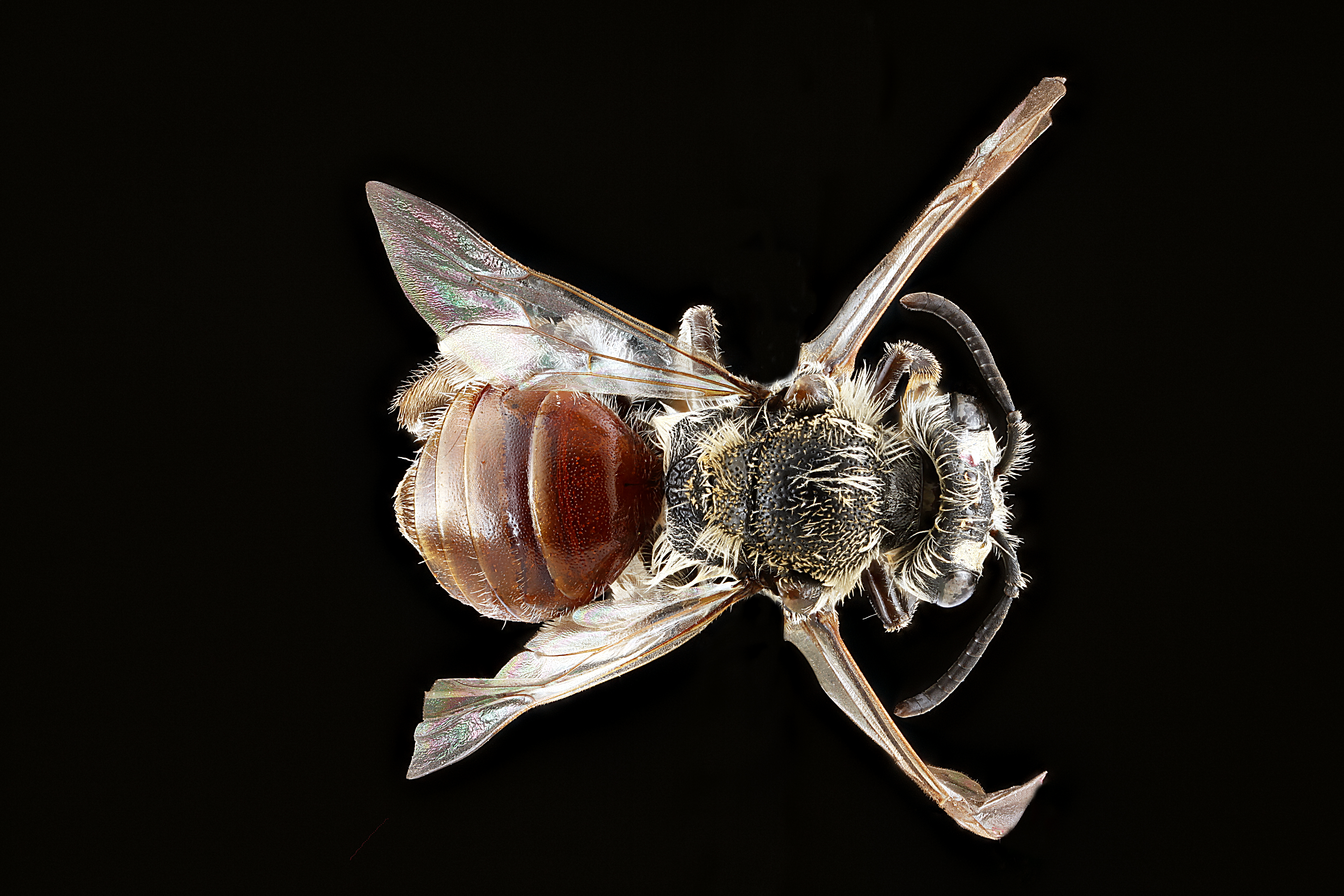 Andrena mariae, female